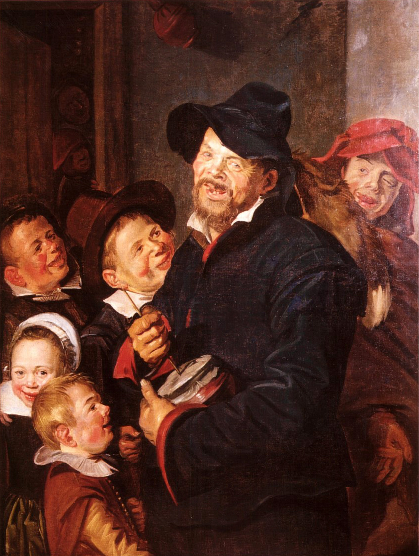 Der Rommelpotspieler mit 5 Kindern, 1618-1622, Öl/LW,Münchener Version,Privatbesitz, selbst fotogr. 2006, Lizenz selbst